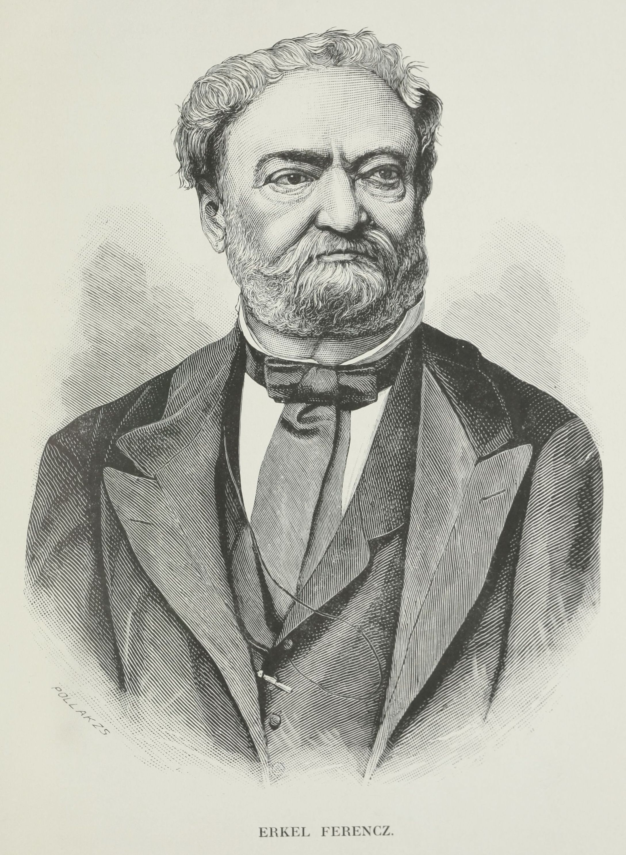 Erkel Ferenc portréja